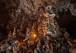 Пећински накит